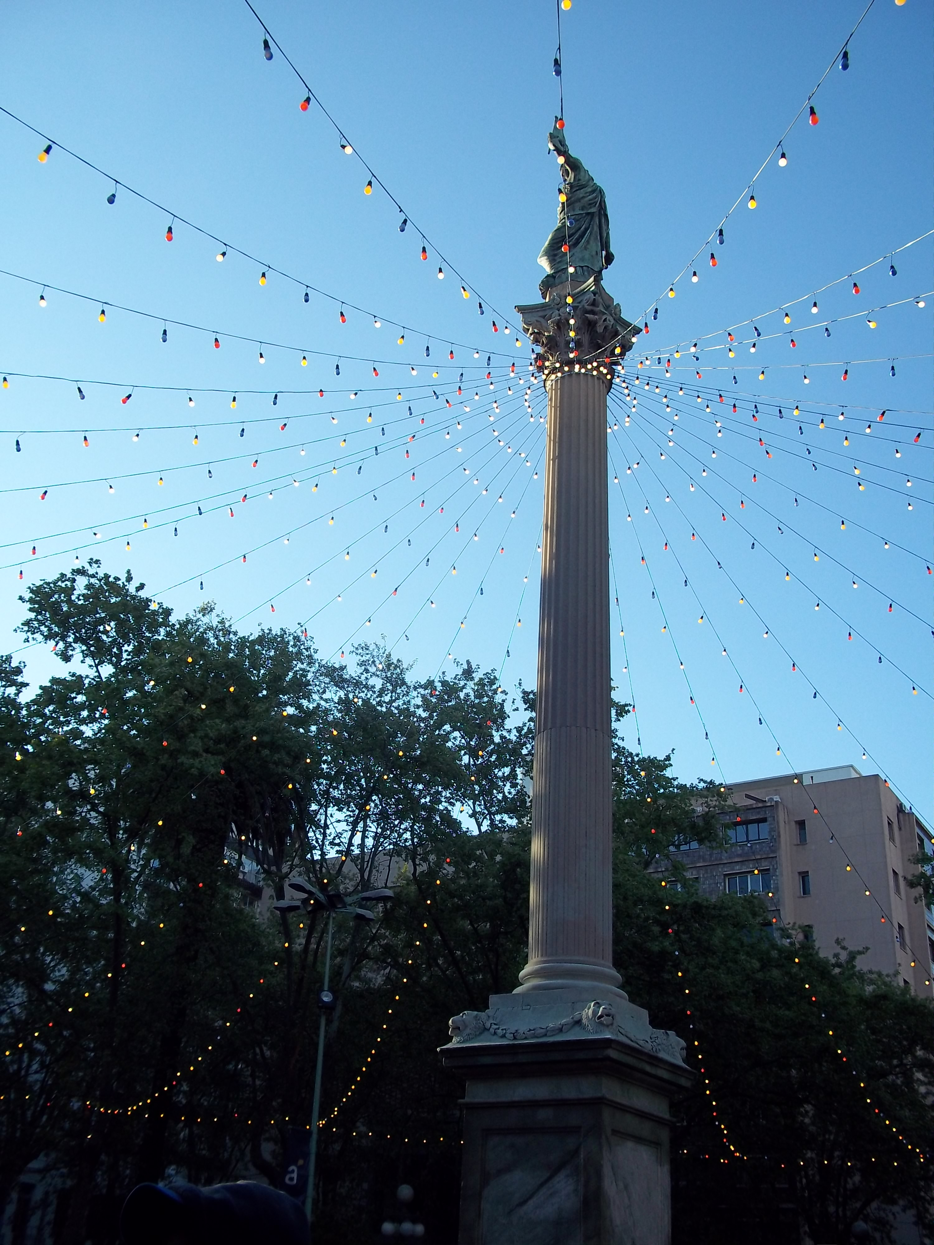 Bombillas de colores adornando la Estatua de la Paz (Plaza Cagancha, Kilómetro 0), Montevideo, Uruguay, el día del festejo del Bicentenario de Uruguay (10 de octubre de 2011).